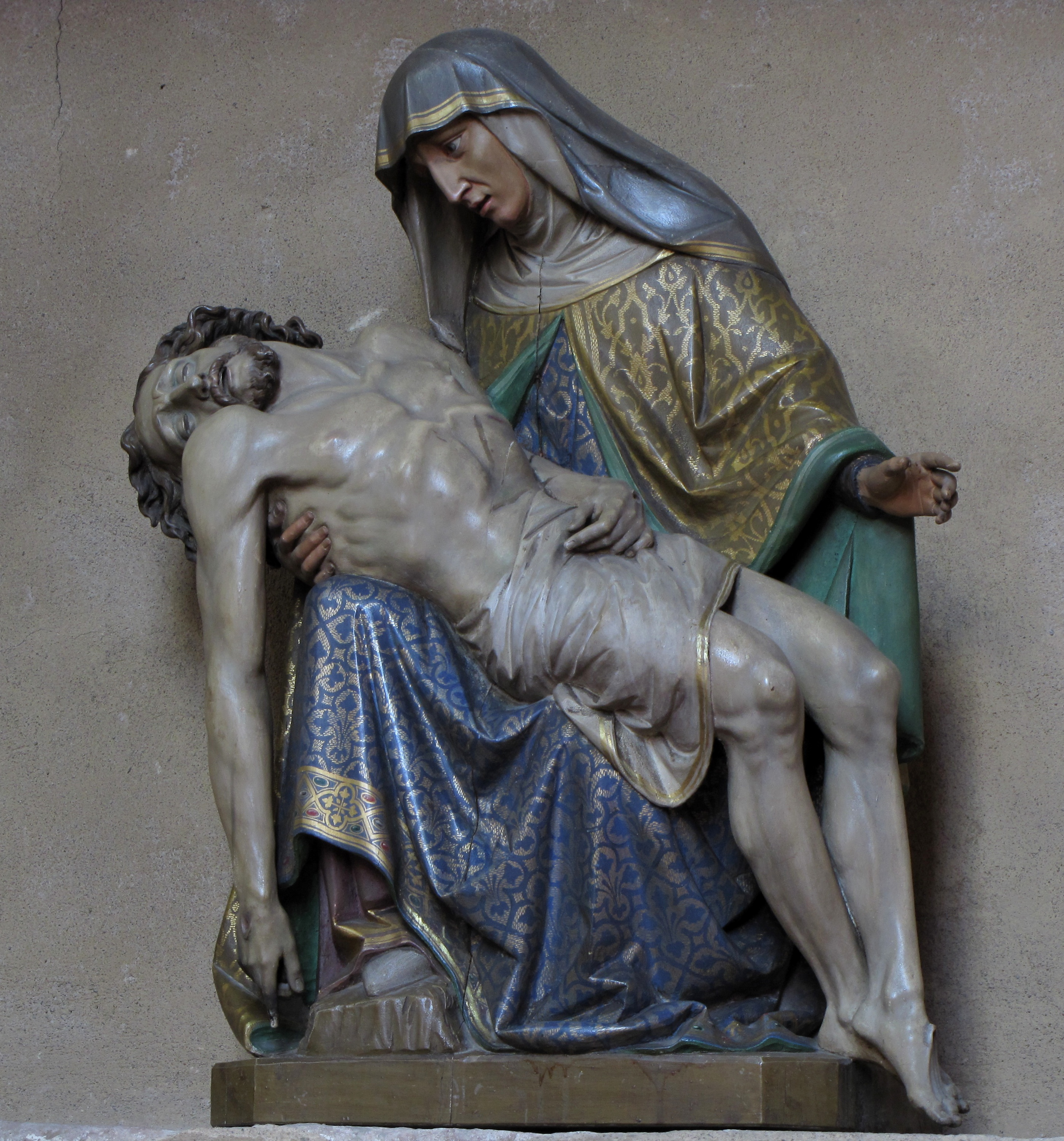 Alsace, Haut-Rhin, Ammerschwihr, Église Saint-Martin (XVIe) (PA00085325, IA68000716) Vierge de Pitié (XVIIIe): This object is classé Monument Historique in the base Palissy, database of the French furniture patrimony of the French ministry of culture, under the references PM68000599 and IM68007070.